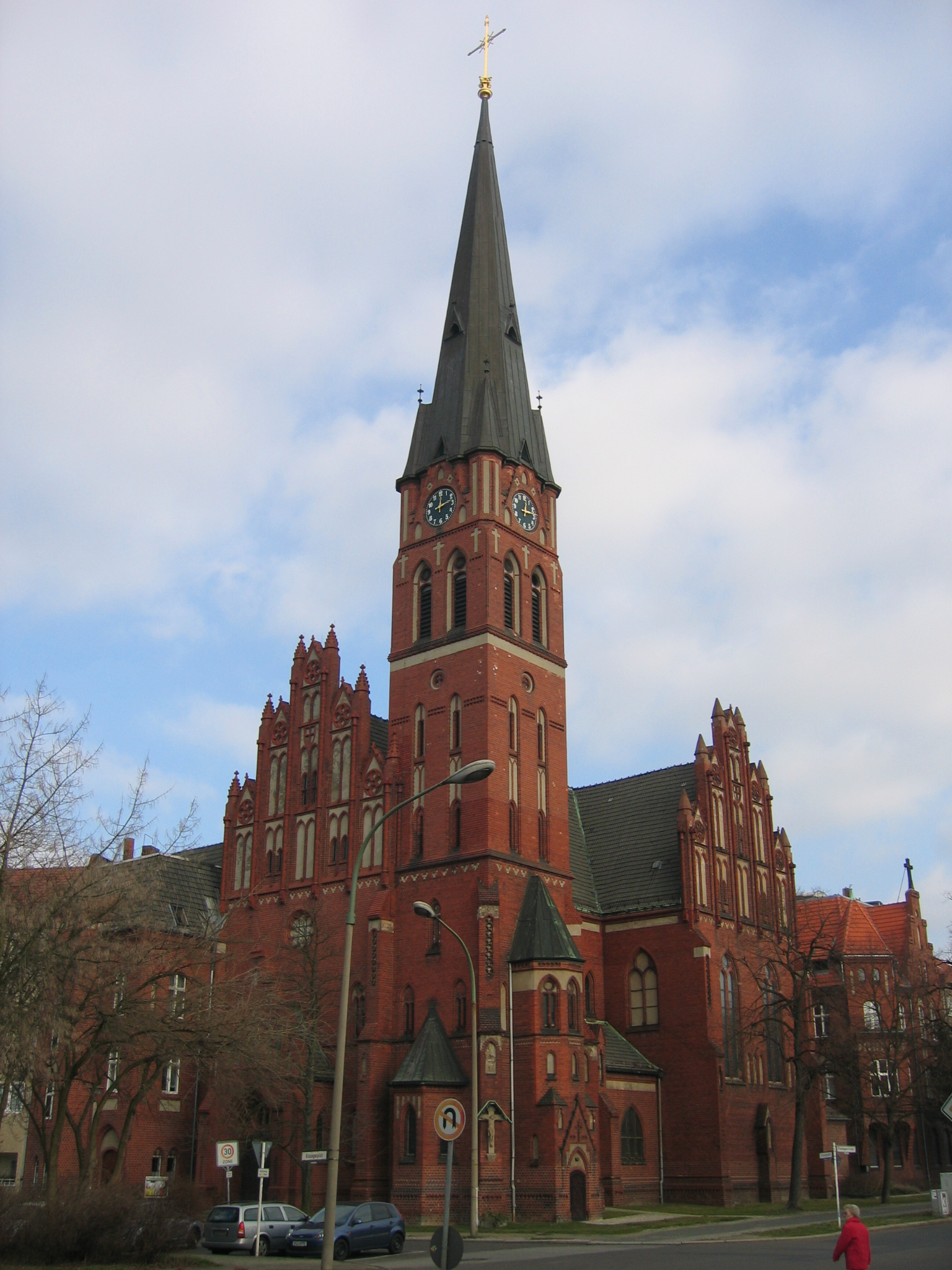 Kirche St. Georg in Berlin-Pankow, Kissingenstraße